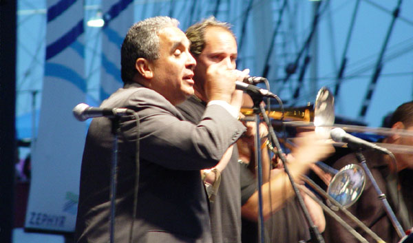 wiilie colon